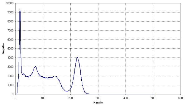 Spektrogramm des Caesium137-Isotops bei einer Messzeit von 500 sec, 9 cm Abstand zwischen Präparat und Szintillationszähler und 700 V Hochspannung für den Zähler, aufgetragen wurden Kernzerfallsereignisse gegen Kanäle